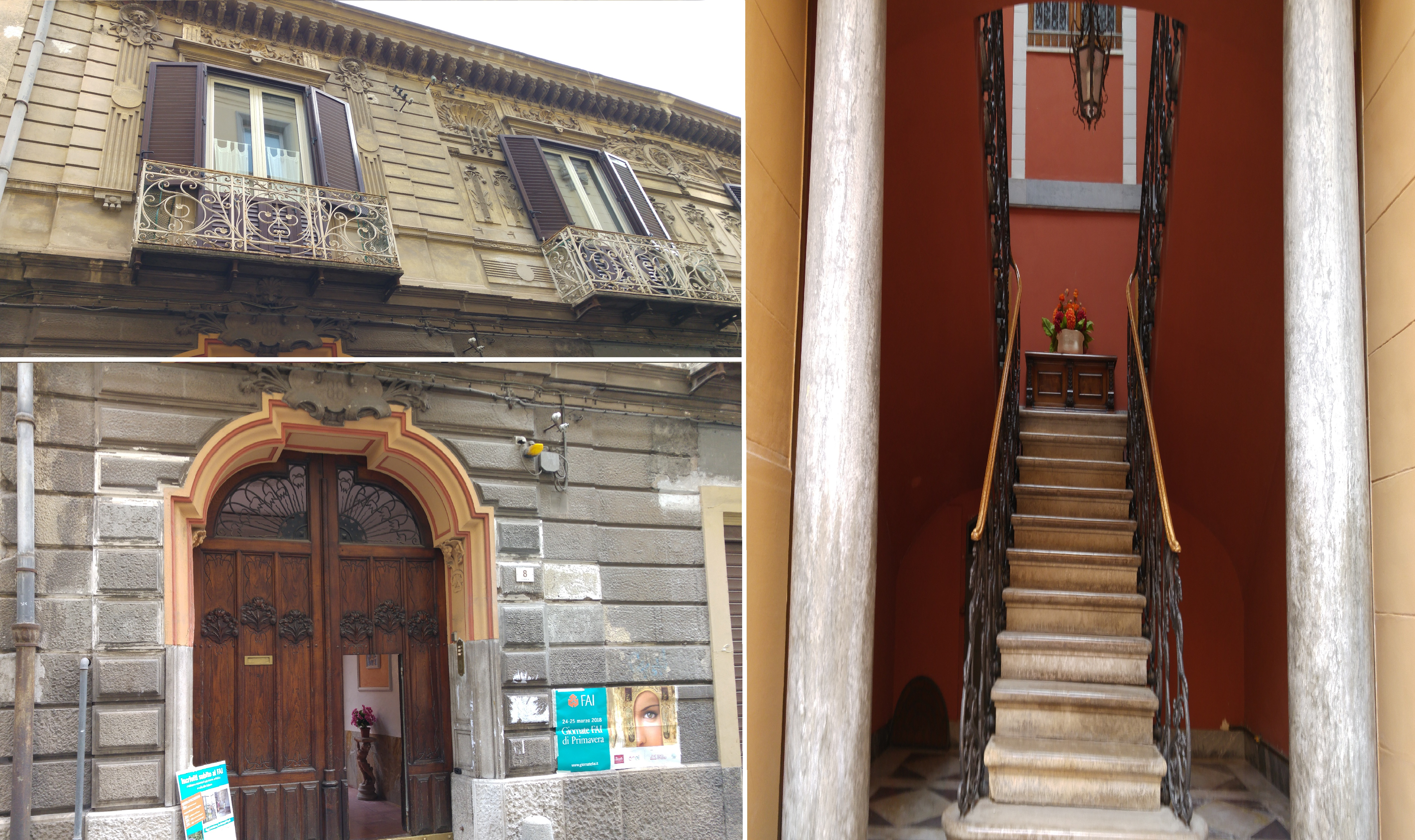 Palazzo Papa (Santa Maria Capua Vetere)